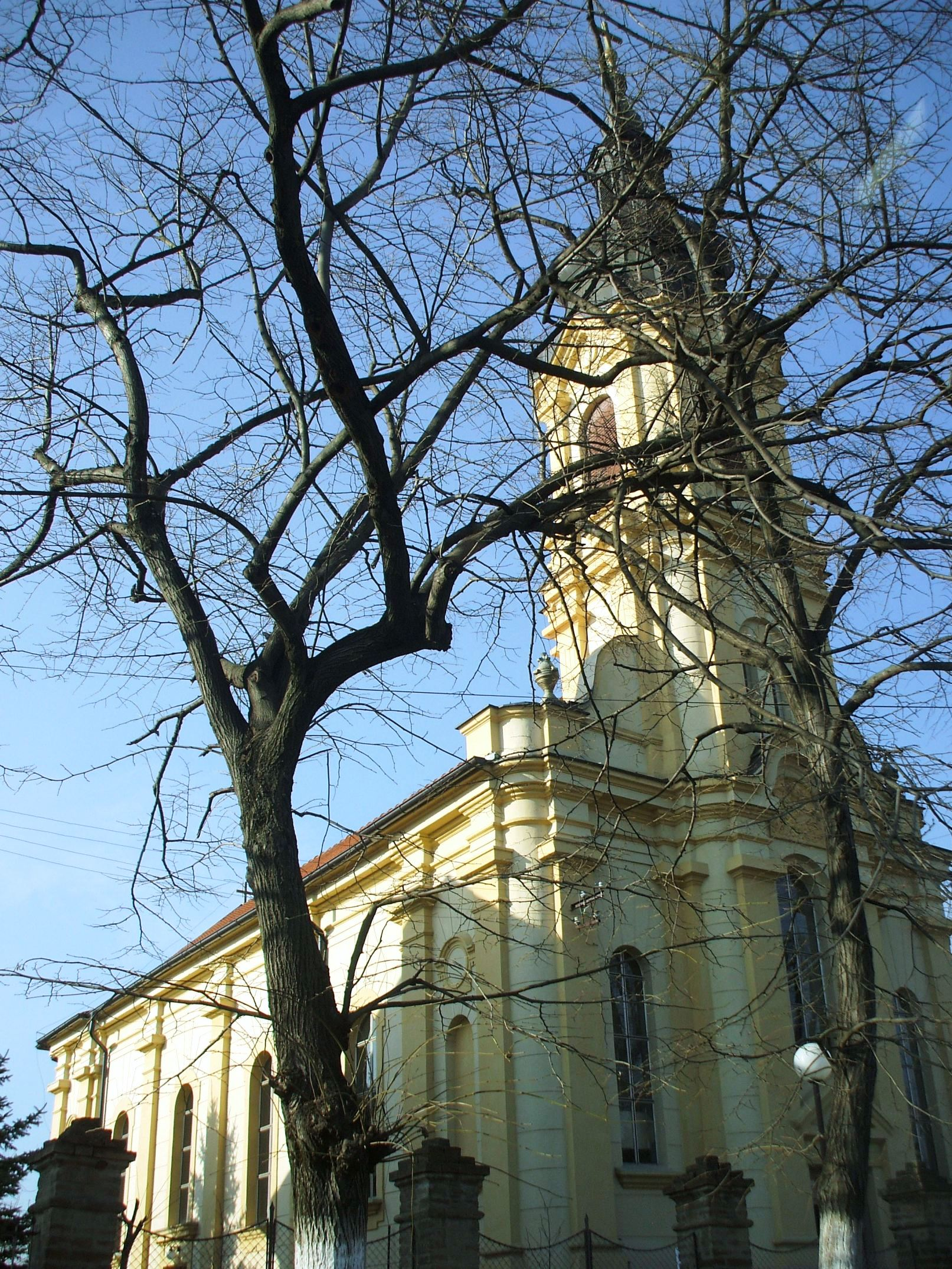 Ердевик (словачка евангелистичка црква)